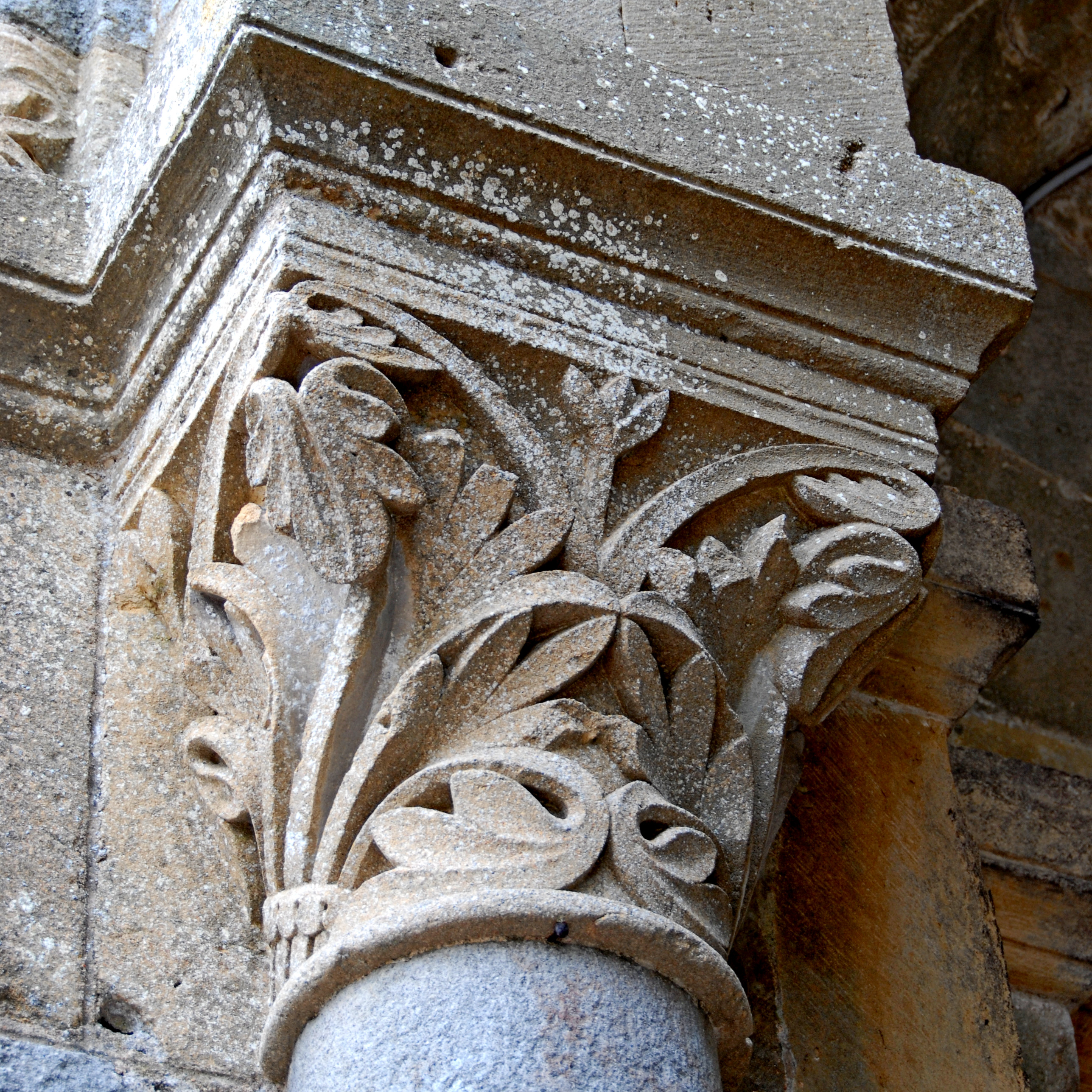 Prioratskirche, Portalvorbau, Blattkapitell